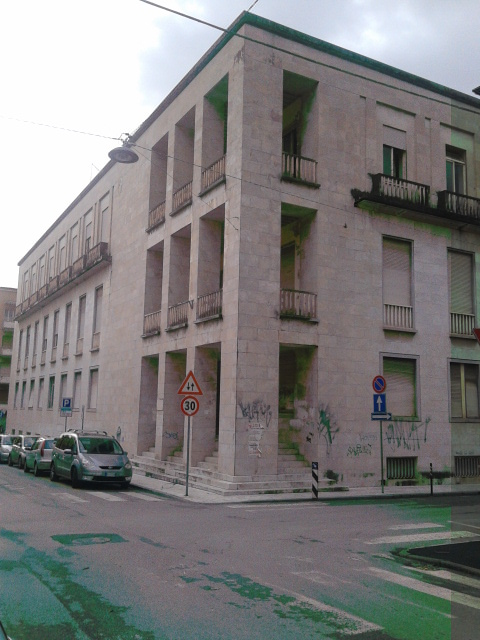 Facciata